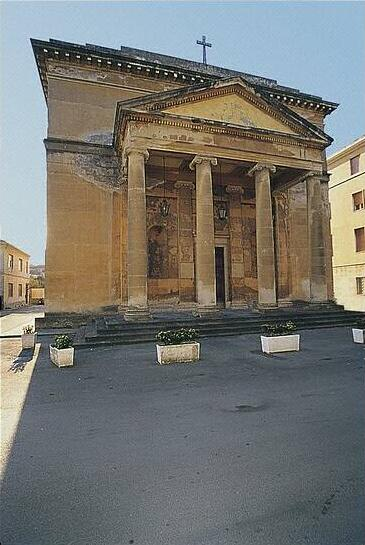 L'ex chiesa anglicana di San Giorgio a Livorno, ora consacrata al culto cattolico